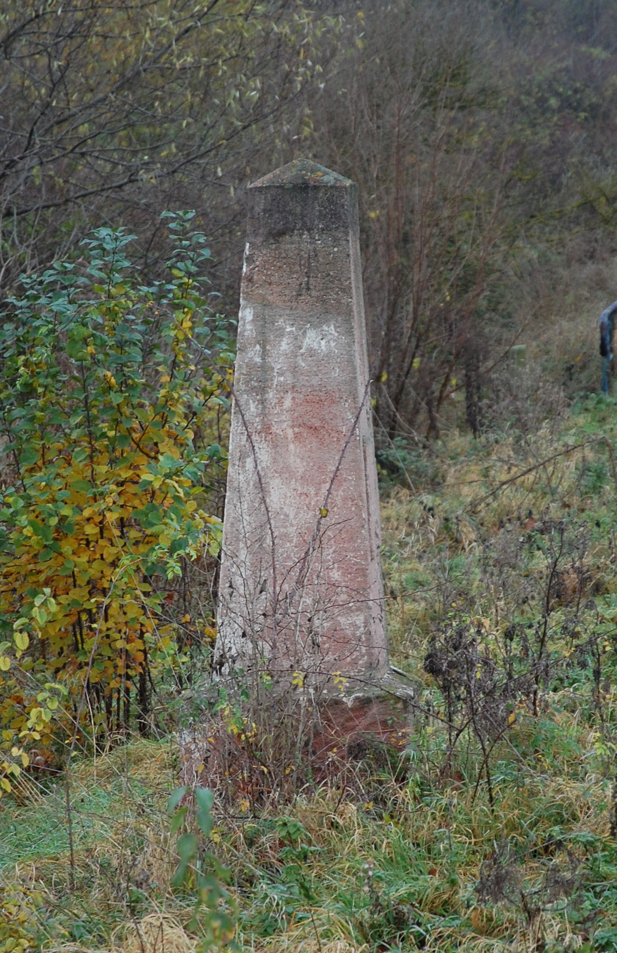 Meilenstein an der L 50 bei Nauendorf